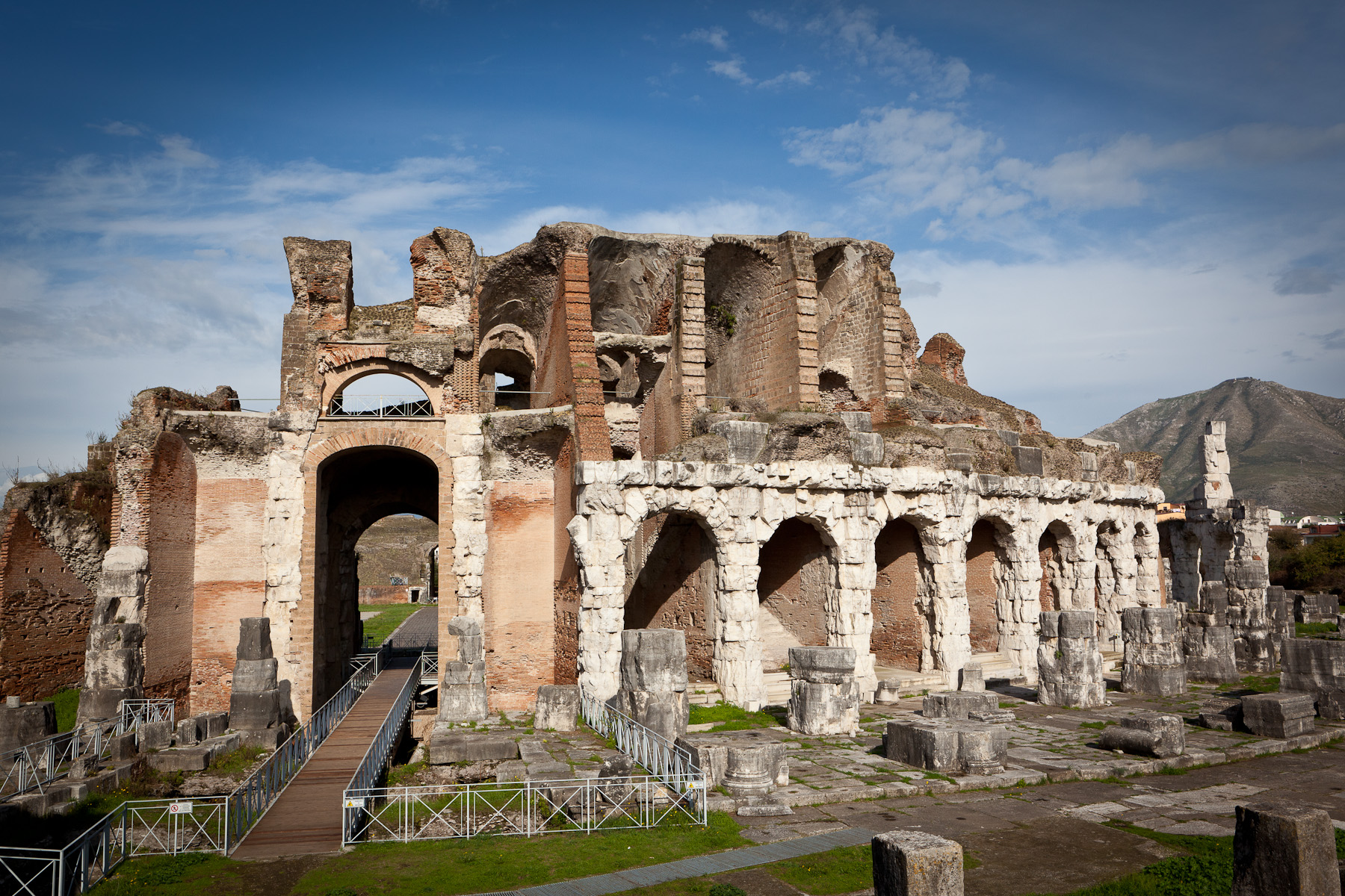 Capua